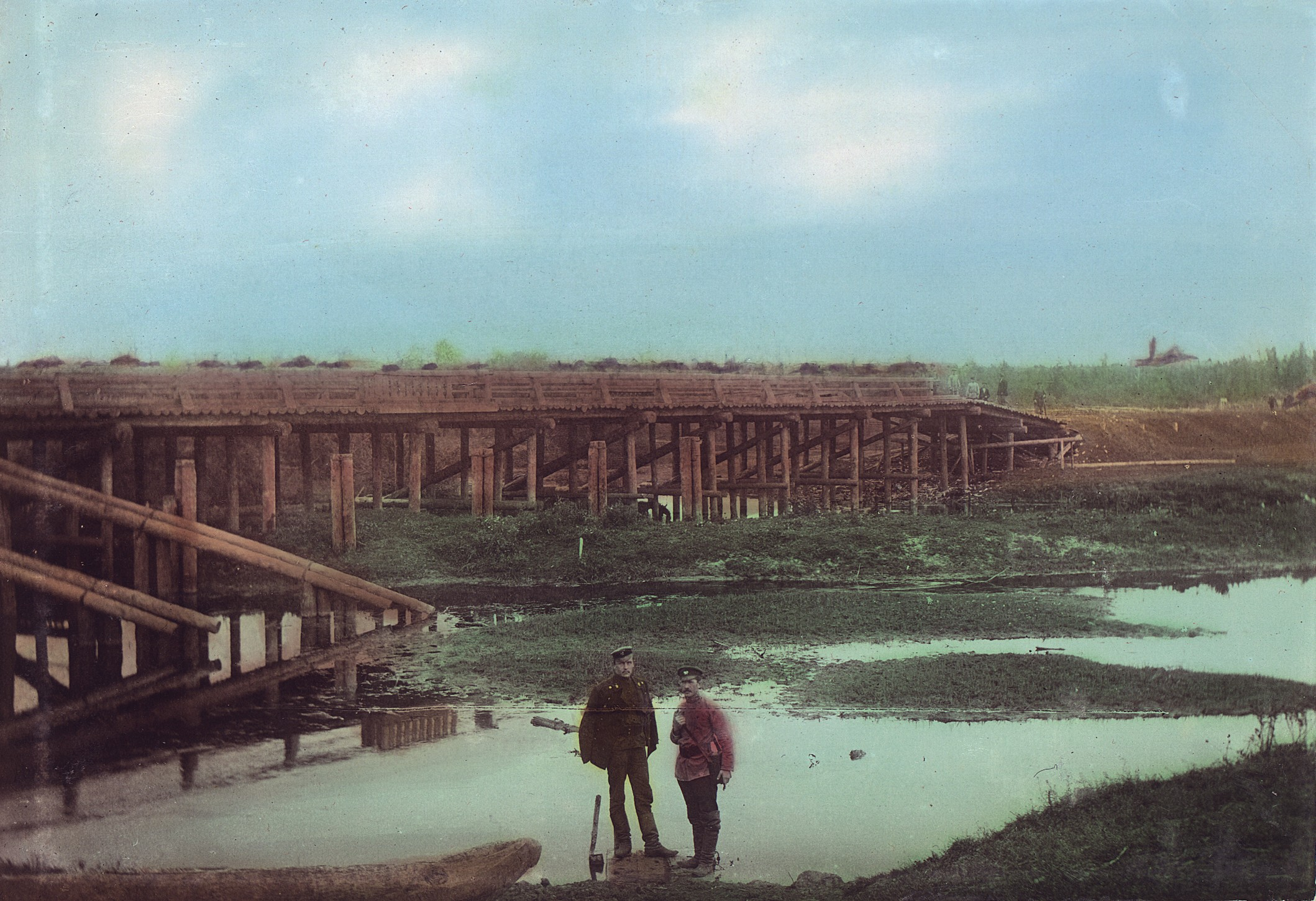 "Мост через реку Тюхтет. Поваренкинская дорога." Поваренкино - в 67 км к северу.